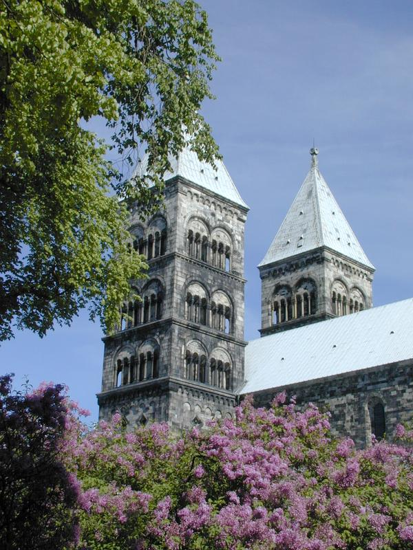 De dom in Lund.